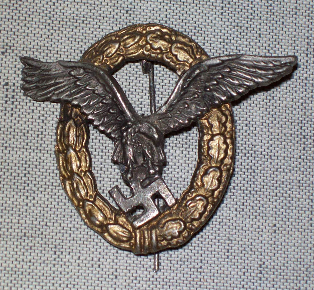 Doppelabzeichen für Flugzeugführer und Beobachter der Luftwaffe im 2. Weltkrieg.